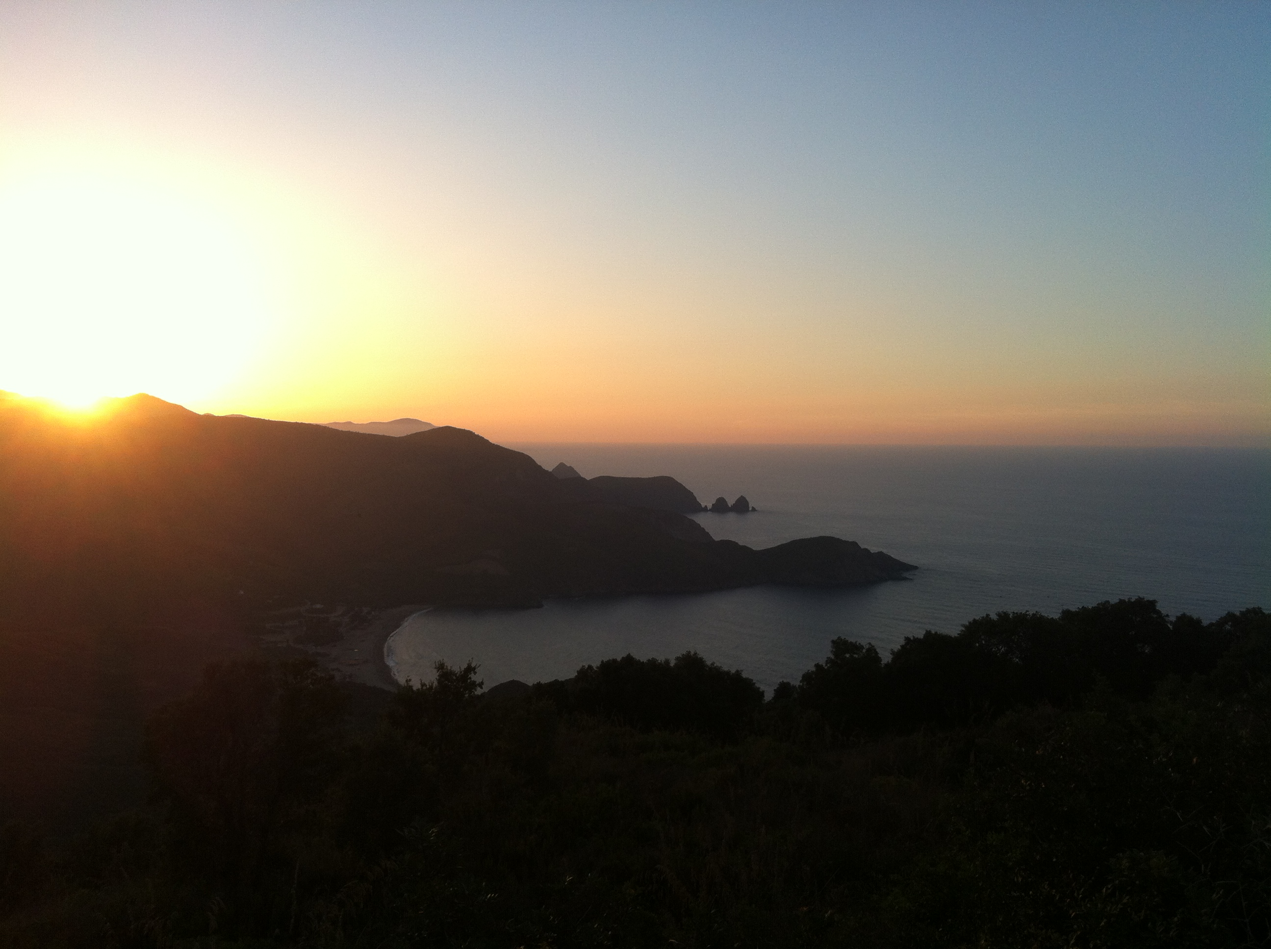 La Grande Plage Djenen El Bey - Oued boukrat de haut